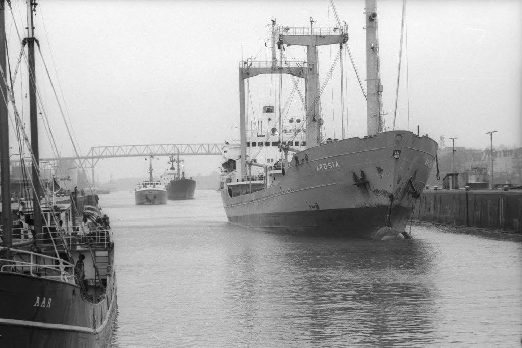 bei Einfahrt in die Holtenauer Schleuse.